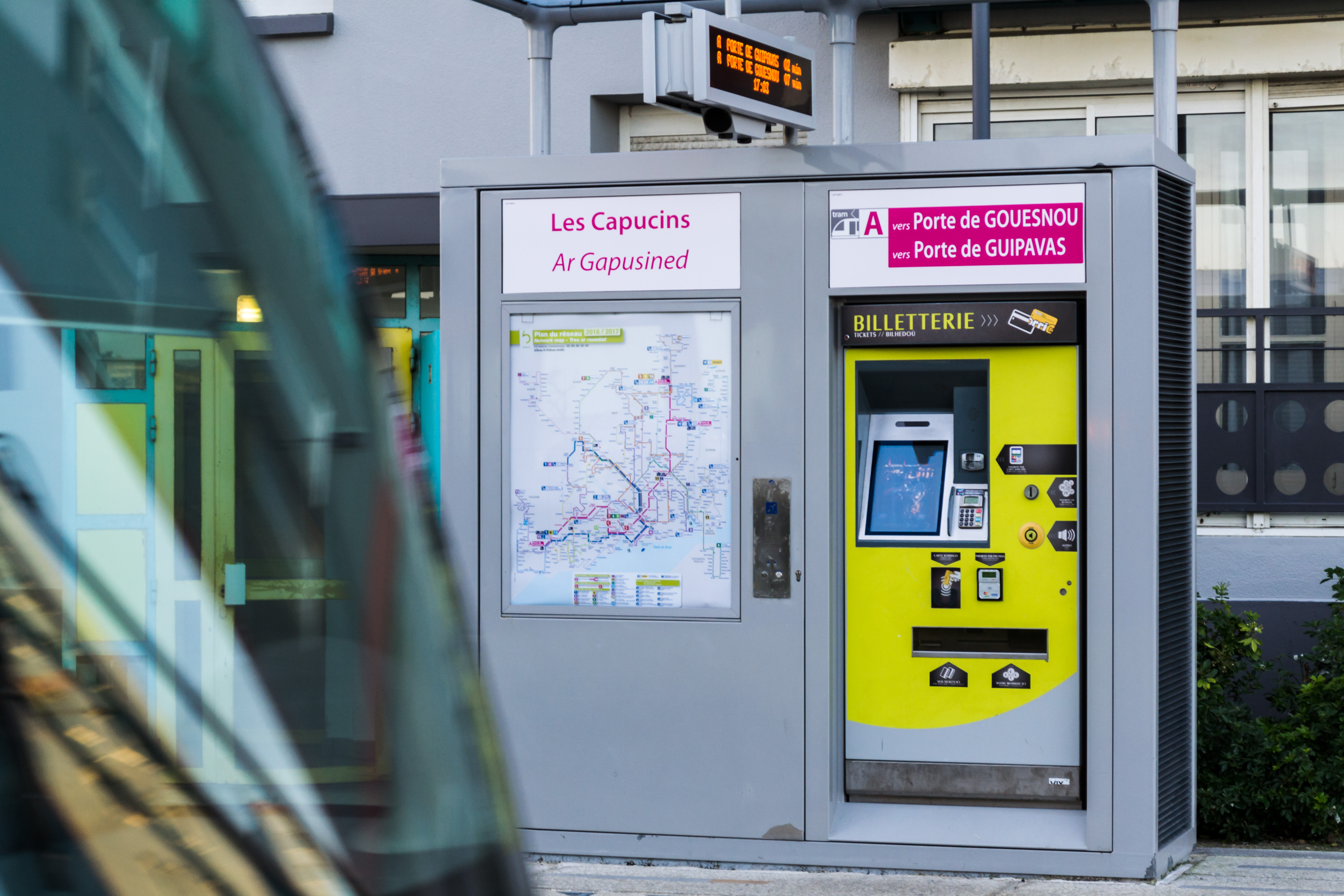 Distributeur automatique Bibus de la station de Tram Les Capucins à Brest.